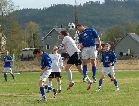 Svorkmo-kamp